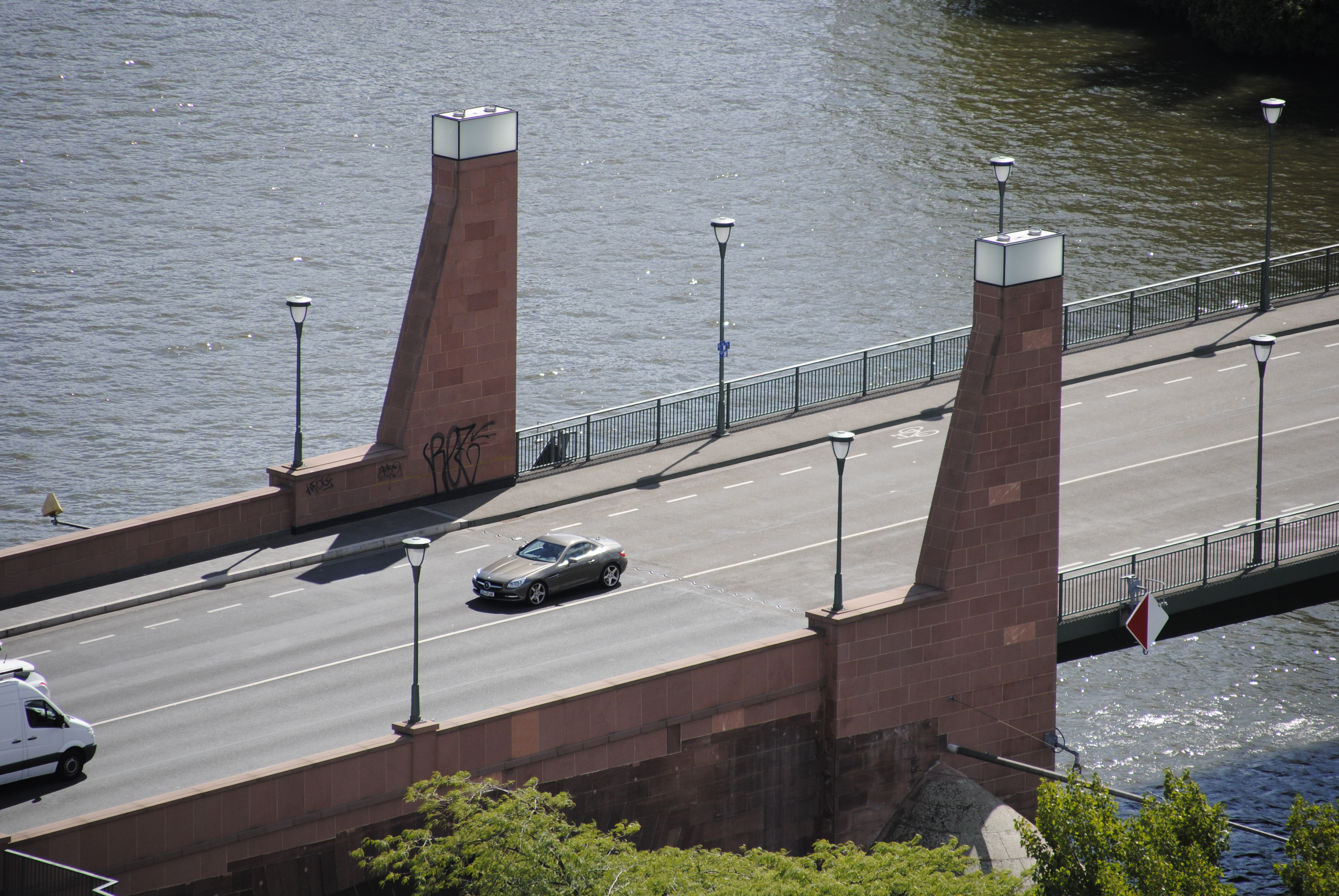 Alte Brücke Frankfurt, Blick vom Domturm